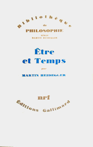 Être et Temps - Gallimard